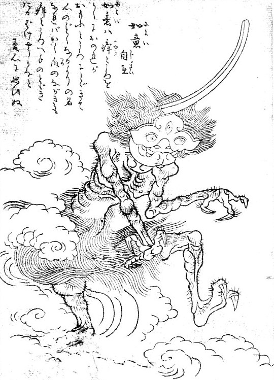 Nyoijizai (如意自在) from the Gazu Hyakki Tsurezure Bukuro (百器徒然袋)